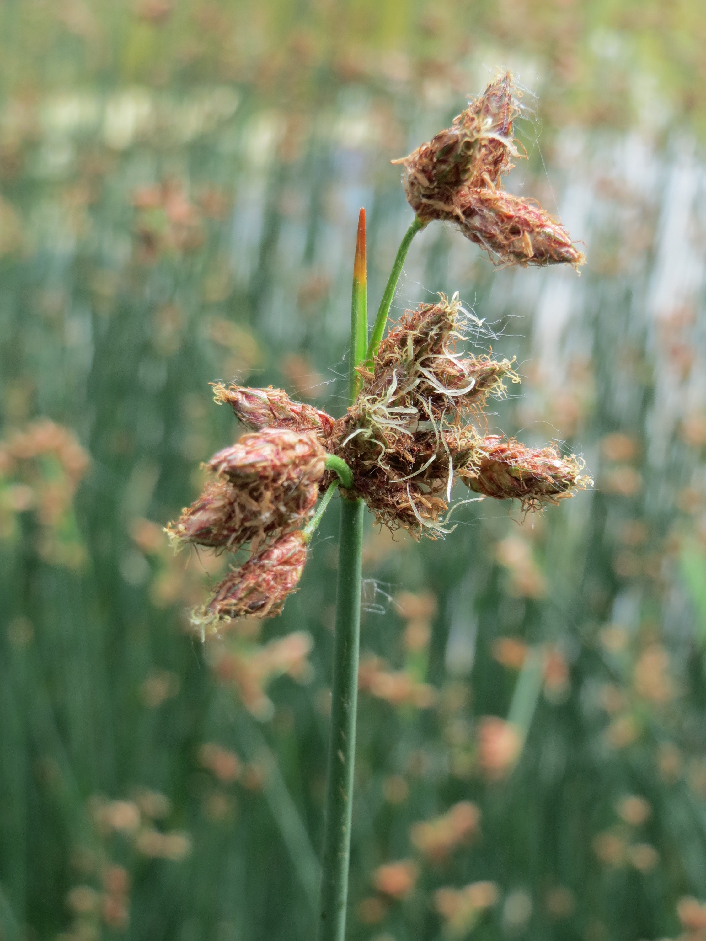 Gewöhnliche Teichbinse (Schoenoplectus lacustris) im Bürgerpark Saarbrücken